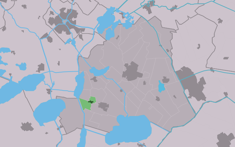 Kaartsje fan himrik fan Jiskenhuzen